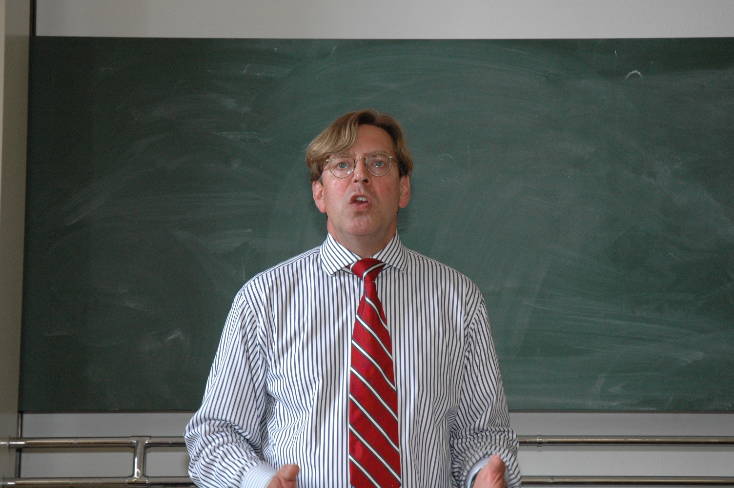 Der Journalist und Buchautor Udo Ulfkotte am 13. Juni 2007